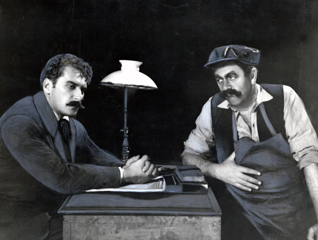 Ivan Cankar, Hlapci, SNG v Mariboru. Na fotografiji: Arnold Tovornik (Kalander), Hugo Florjančič (Jerman).